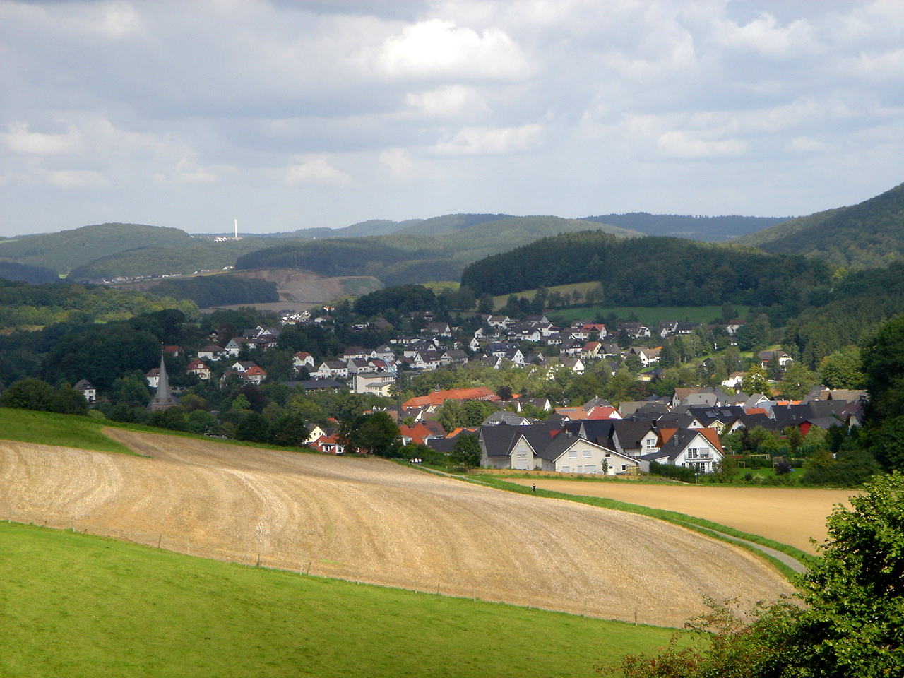 Balve, vom Galgenberg aus gesehen